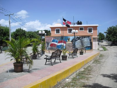 Monumento a Juan Pablo Duarte, Vallejuelo Republica Dominicana.